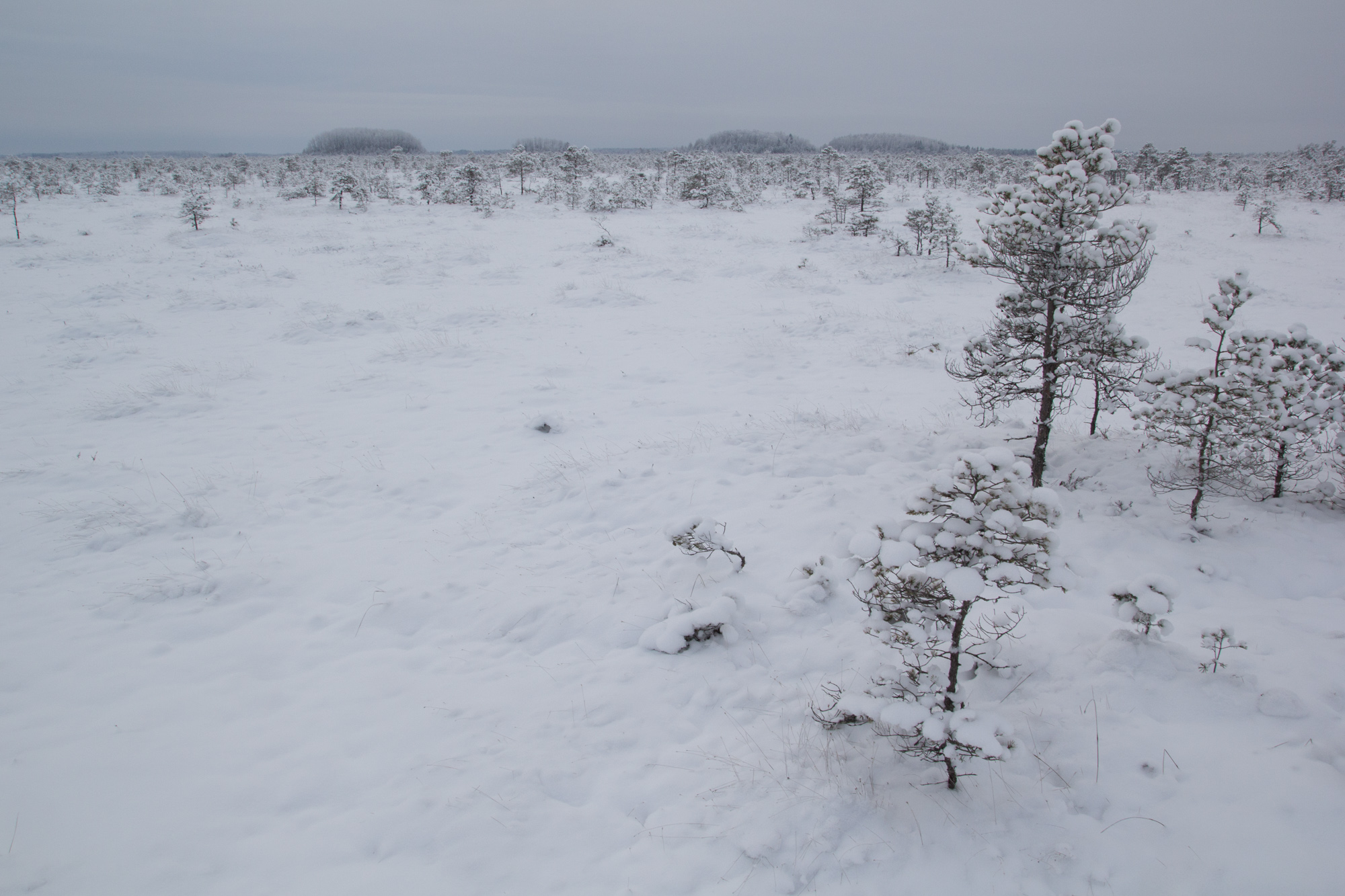 Meelva raba